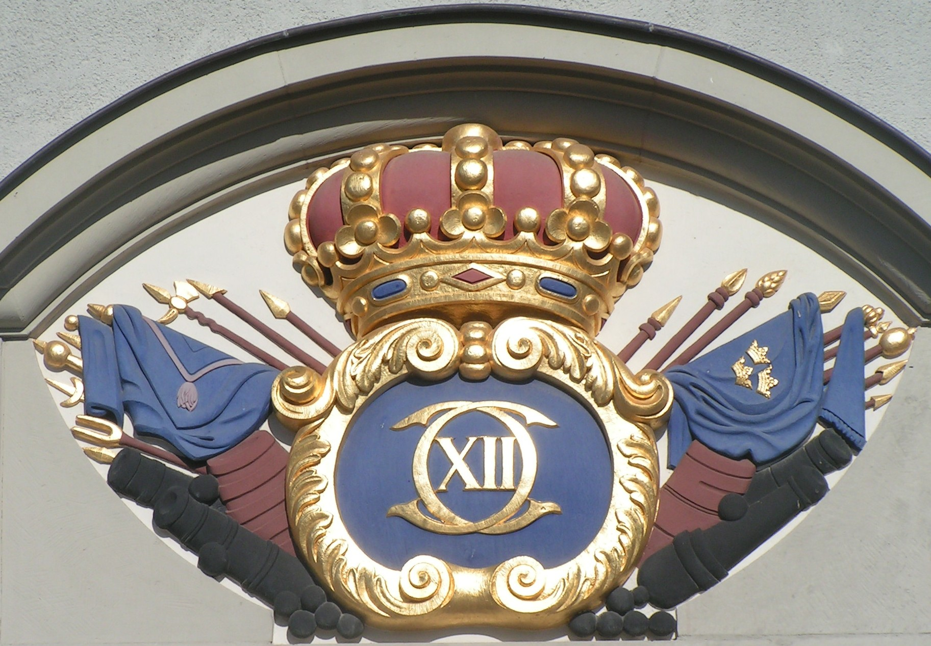 Das Wappen Karl XII., fotografiert am Stadtarchiv Wismar